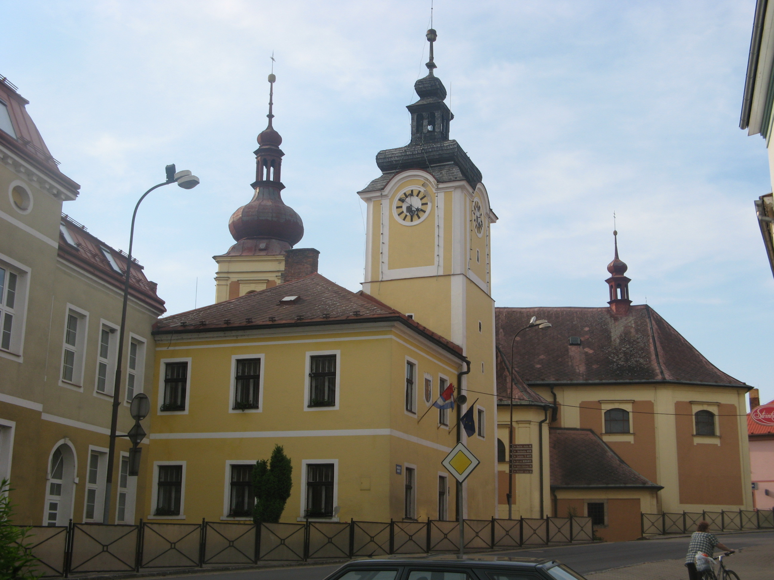 Březová nad Svitavou, vlevo škola, uprostřed radnice, vzadu kostel sv. Bartoloměje